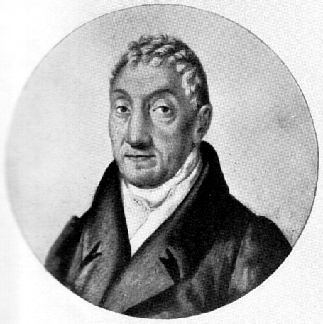 Franz Kirms, Miniaturgemälde, Sammlung Kippenberg Leipzig (1932); Franz Kirms (* 1750; † 1826) war der Amtsgenosse von Johann Wolfgang von Goethe in der Leitung des Weimarer Theaters.